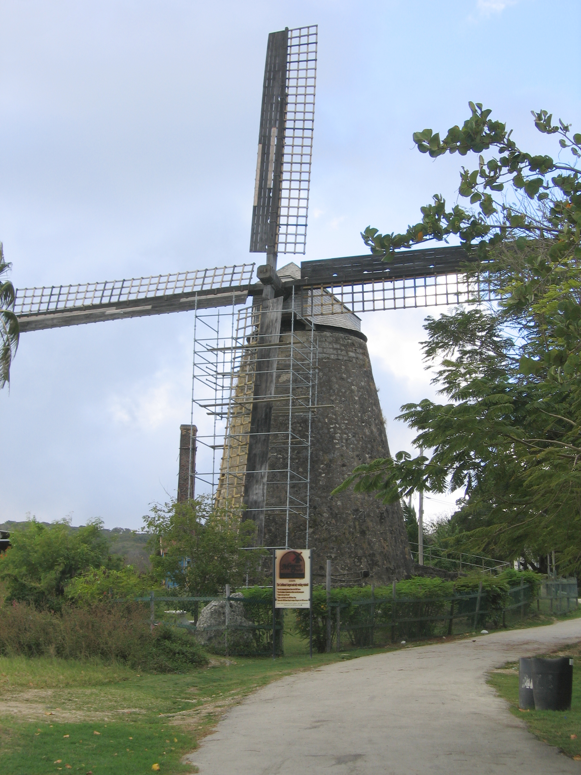 Morgan Lewis Windmill, Morgan Lewis, Saint Andrew, Barbados.